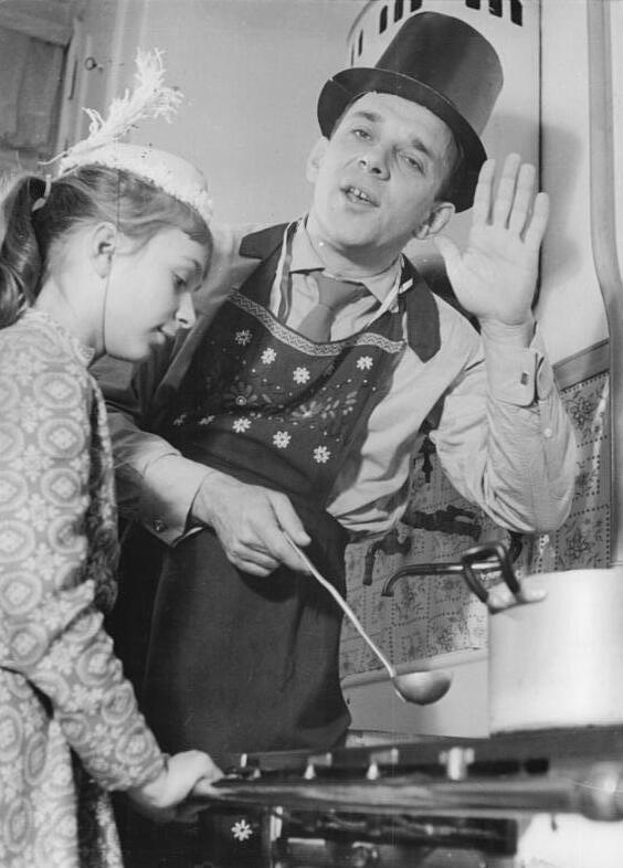 Neujahrsfest, Bleigießen Zentralbild Quaschinsky 18.12.1957 Sylvester bei Werner Lierck. In der Küche! Unser Reporter traf Werner Lierck und seine Tochter gerade beim Bleigiessen an. Da dies eine besondere Handlung ist, wollte er nicht gestört werden.